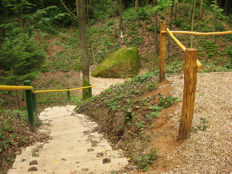 Нявесцін камень. Ашмянскі раён